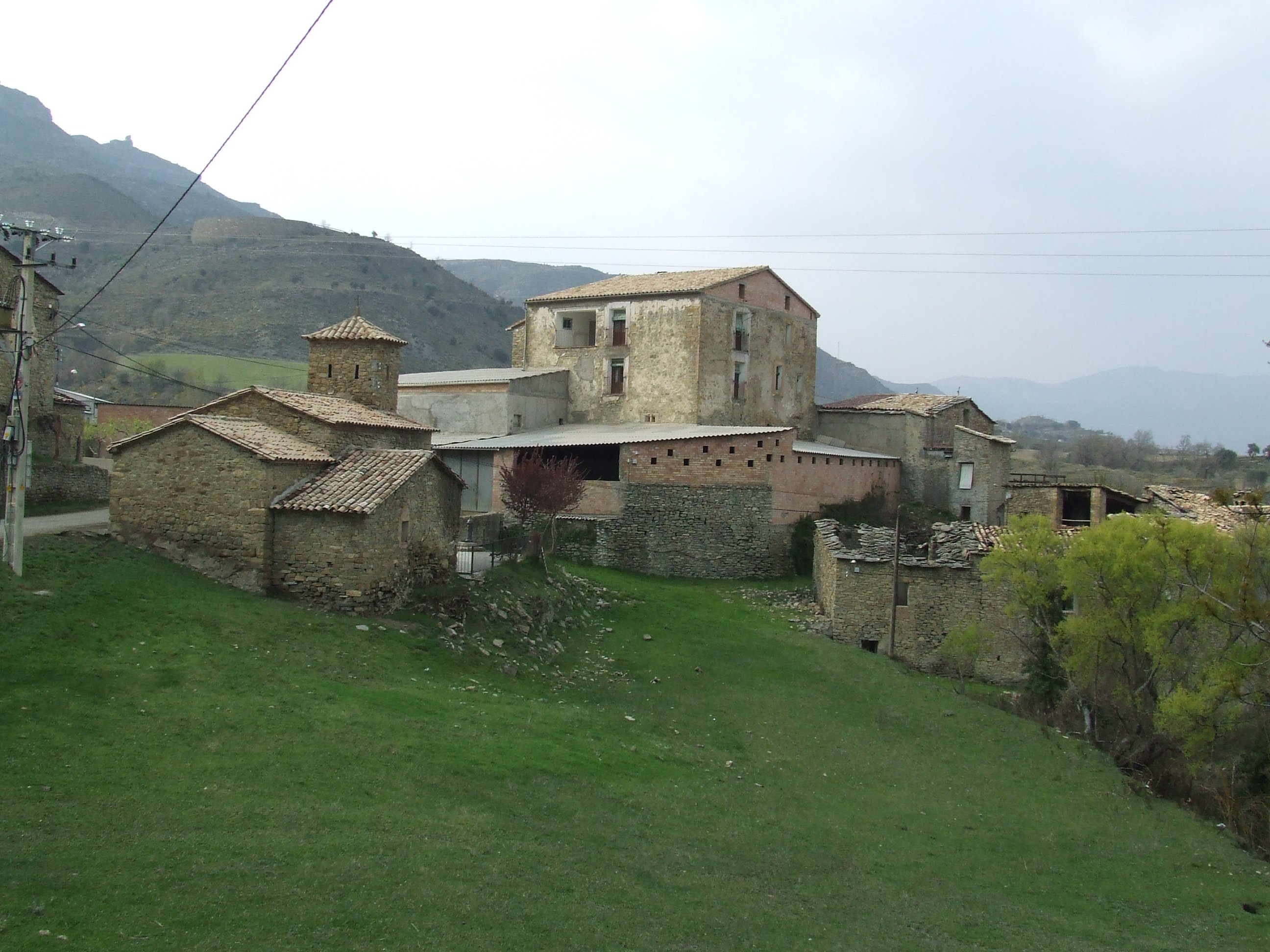 El poble de Puigverd de Talarn des del sud (Fígols de Tremp, Tremp, Pallars Jussà)